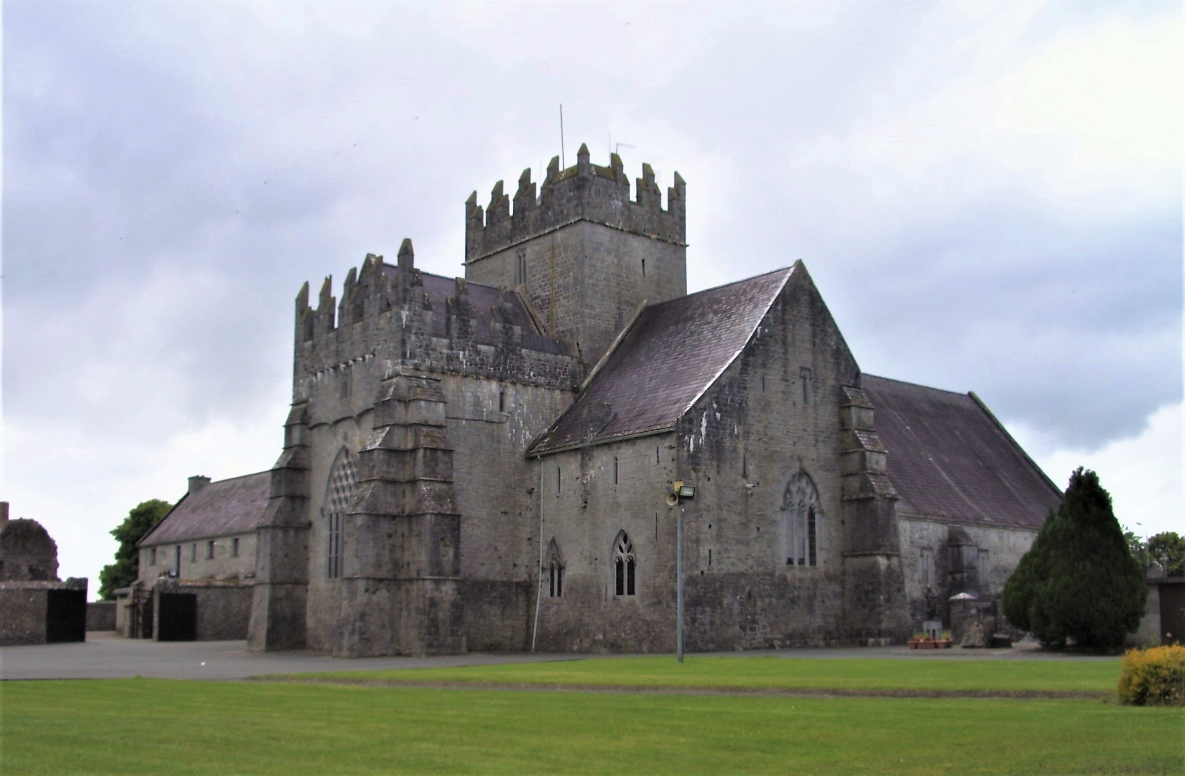 Holy Cross Abbey